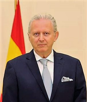 José Maria Matrés Manso, spanischer Botschafter in Osttimor